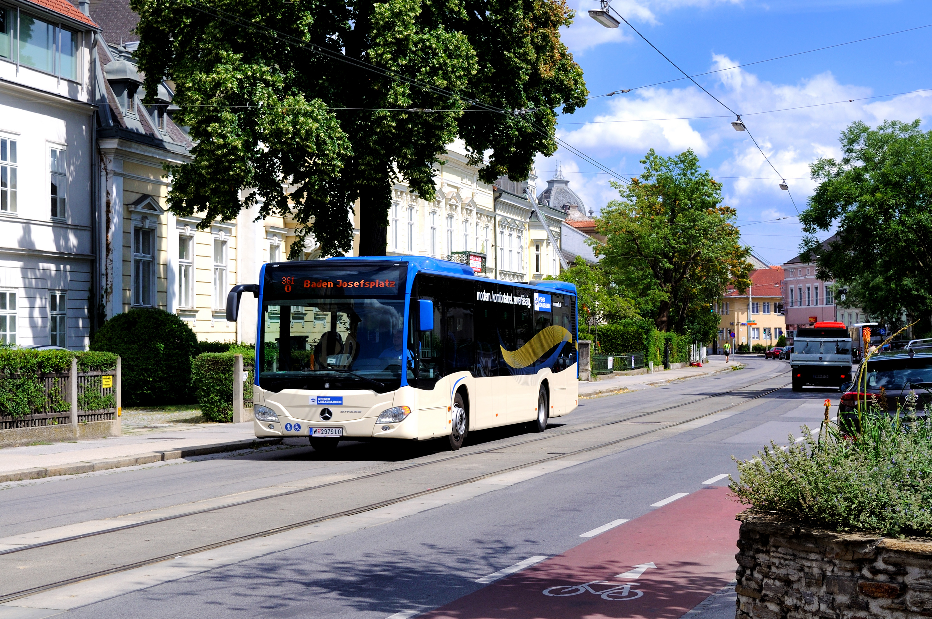 Mercedes-Benz Citaro 2, W 2979 LO, als Linie 361 am Kaiser-Franz-Joseph-Ring in Baden.